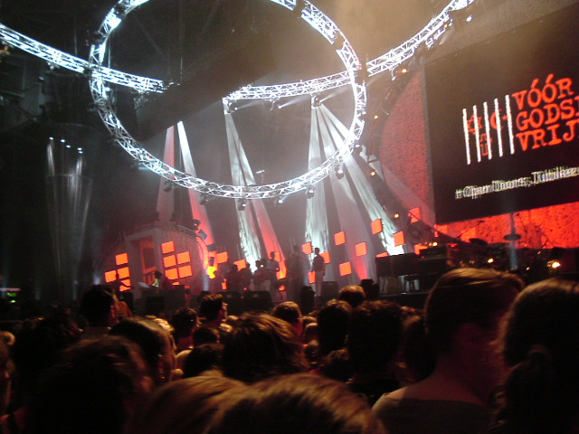 Zelfgemaakte foto tijdens de EO Jongerendag 2004, voor openbare publicatie geschikt.